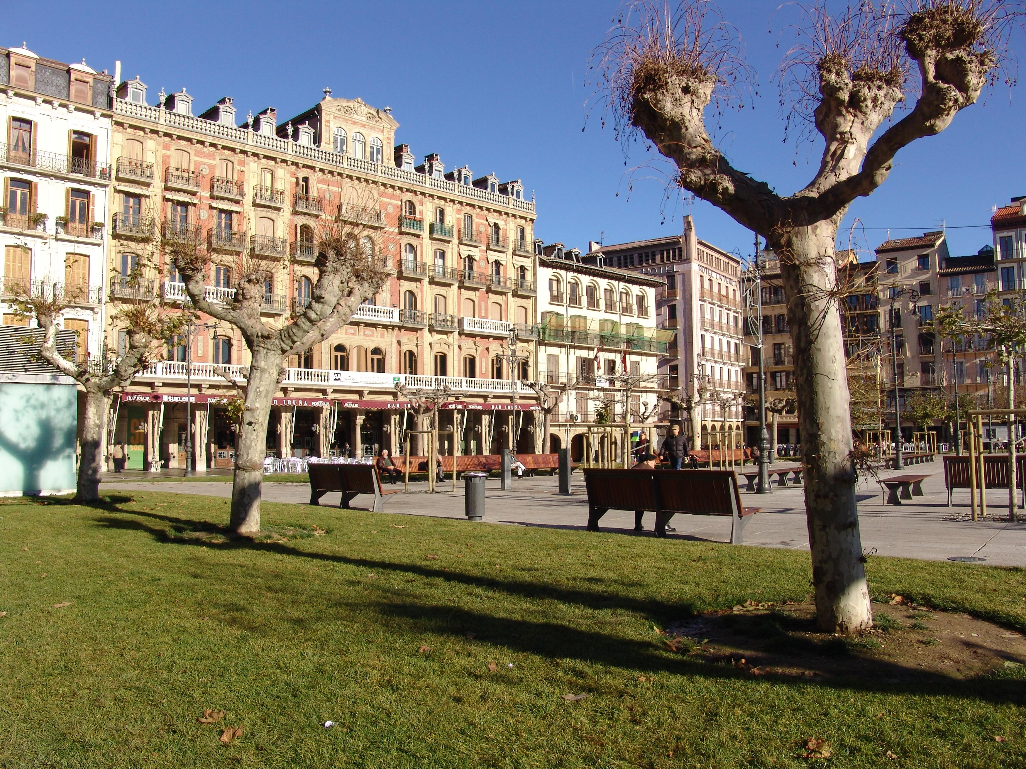 Vista de parte de la Plaza del Castillo de Pamplona (España). Fotografía por comakut.